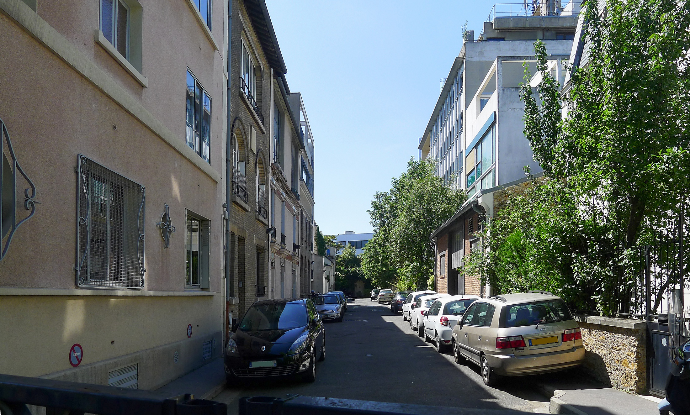 Villa du Parc-Monsouris - Paris XIV